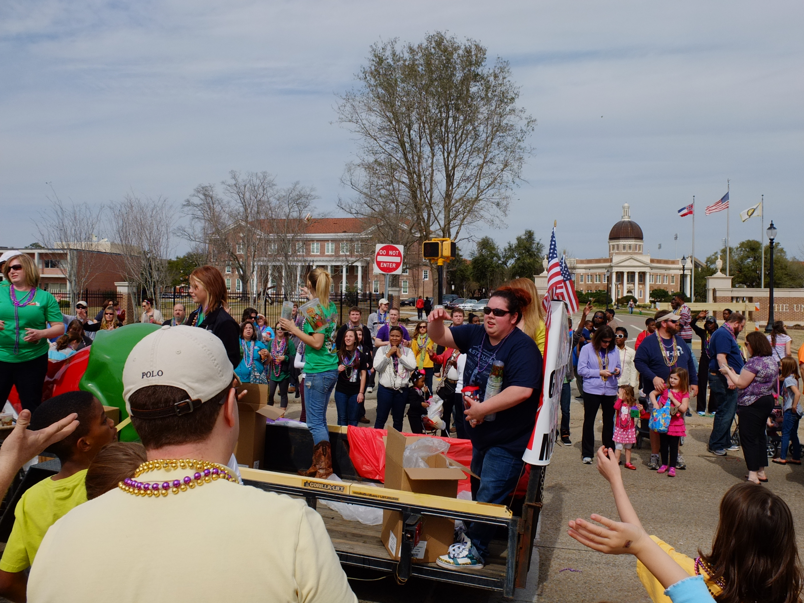 Hattiesburg, 2014 (Caerus)